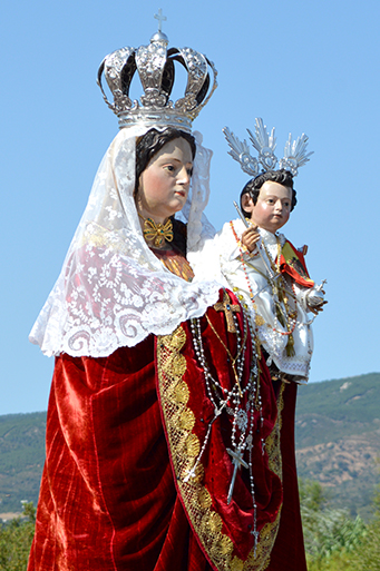 Perfil patrona Tarifa